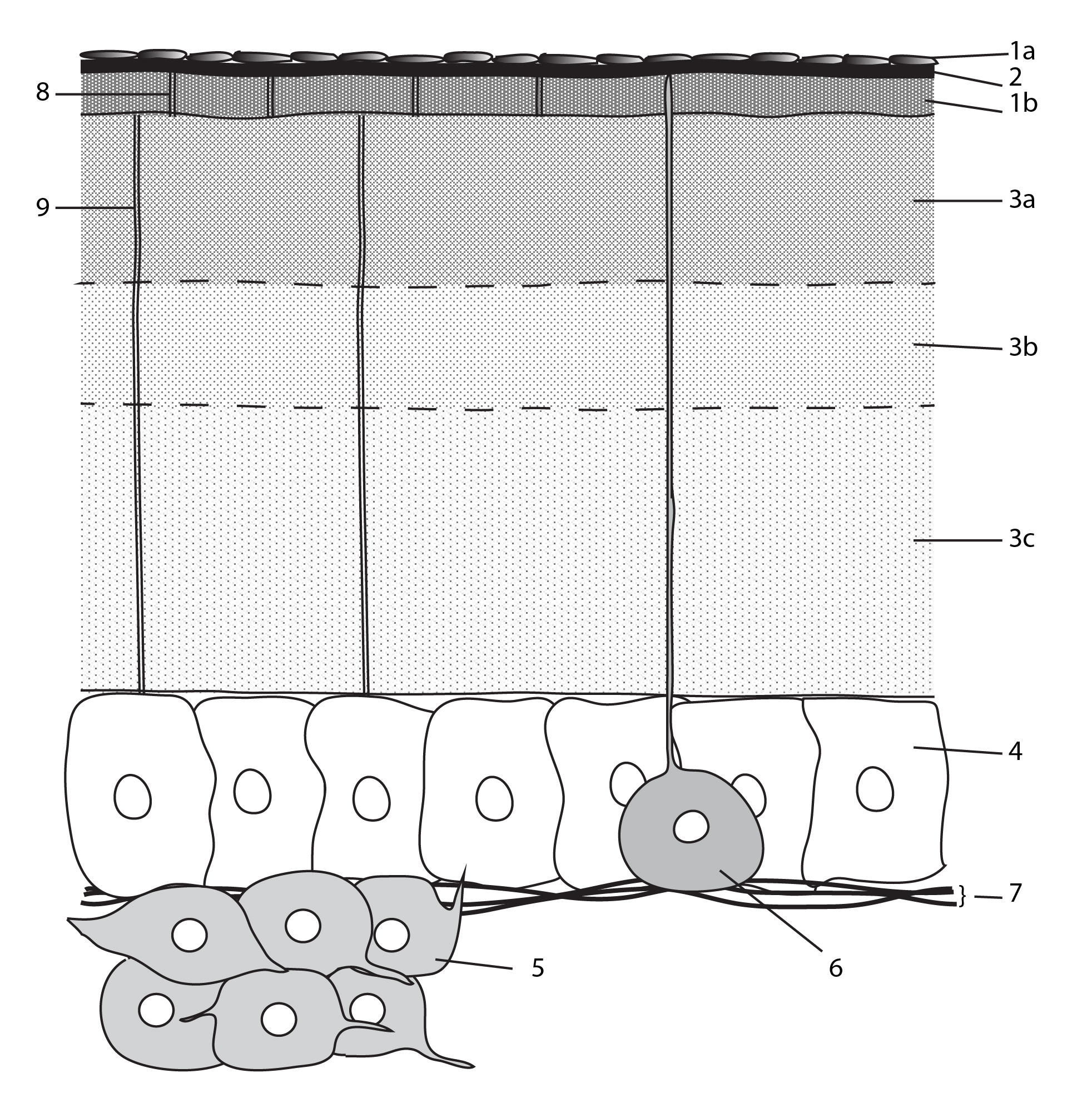 Schéma du système tégumentaire des Arthropodes 1. épicuticule, a.cément et cire, b. épicuticule interne; 2. Enveloppe de cuticuline; 3. Procuticule, a. exocuticule, b. mésocuticule, c. endocuticule; 4. cellules épidermique; 5. Oenocytes; 6. Glande dermale; 7. lame basale; 8 et 9. canaux de transports de lipides.